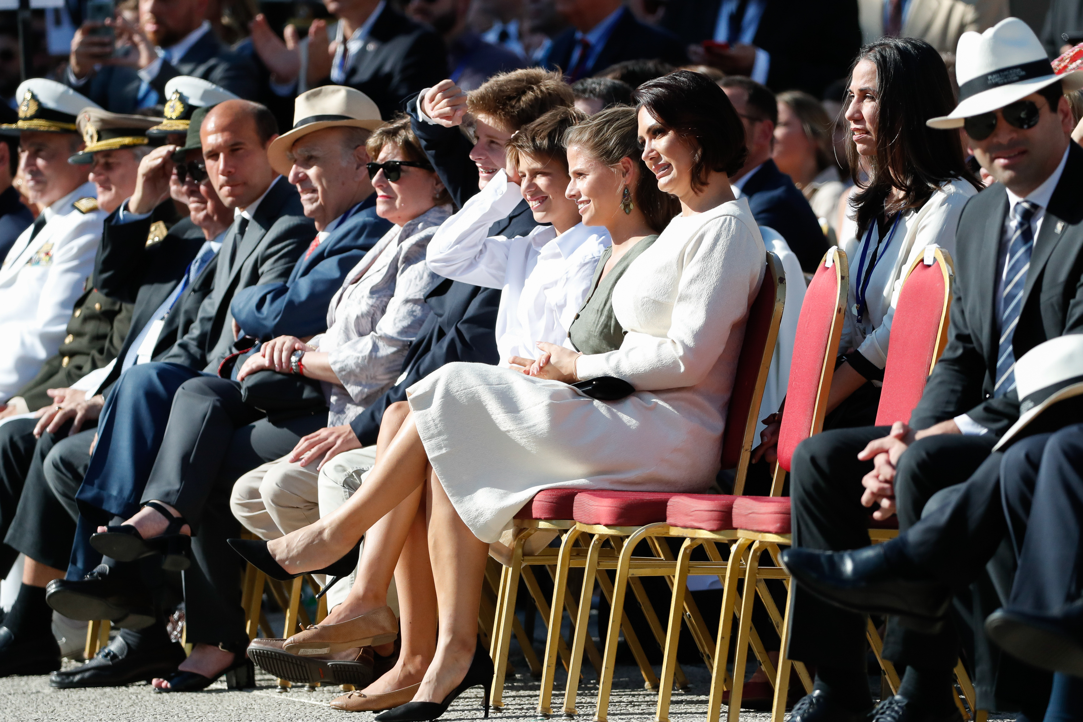 (Montevidéu - Uruguai, 01/03/2020) Cerimônia de Transmissão de Mandato Presidencial.